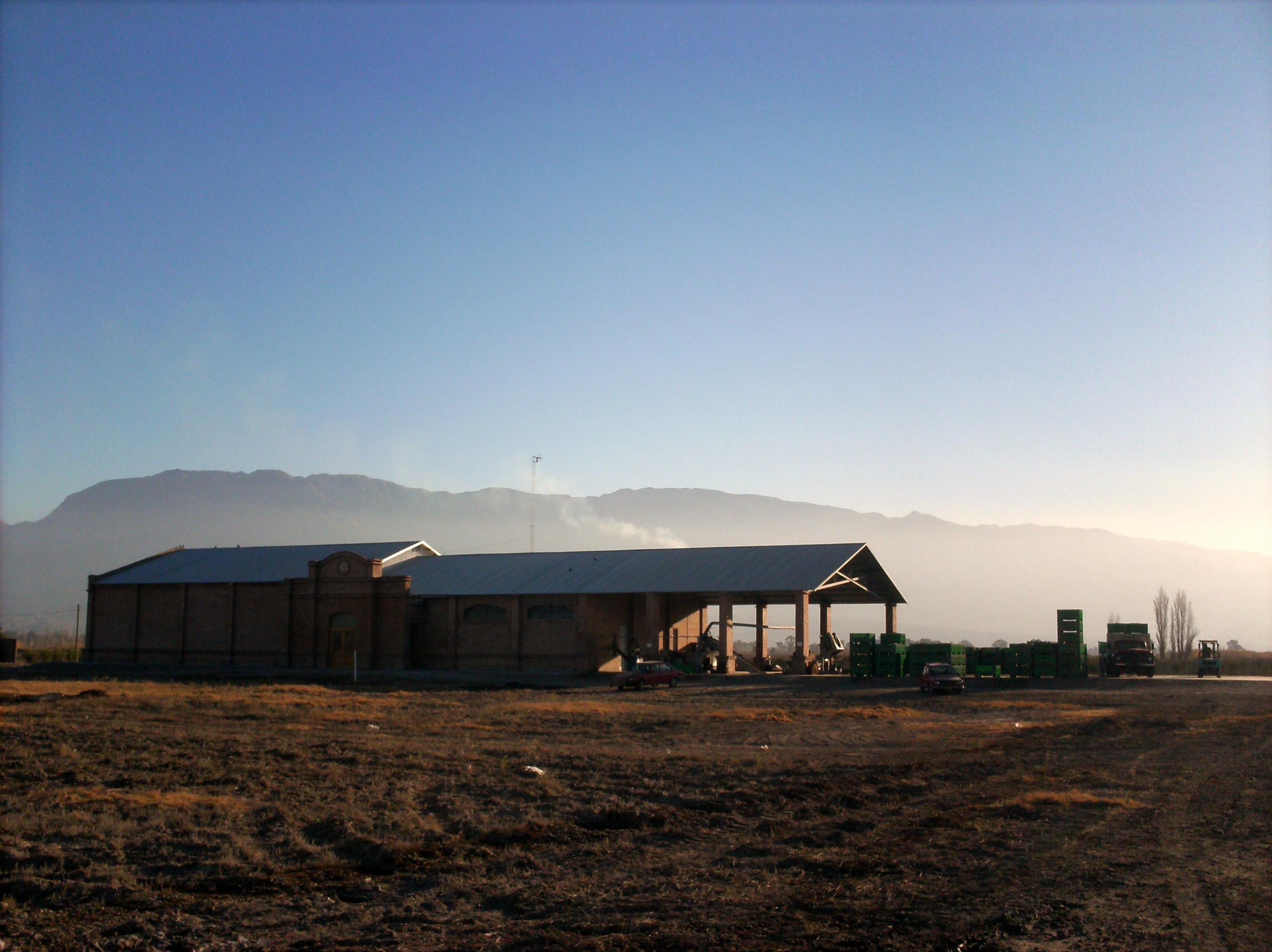 planta frutal pocitana